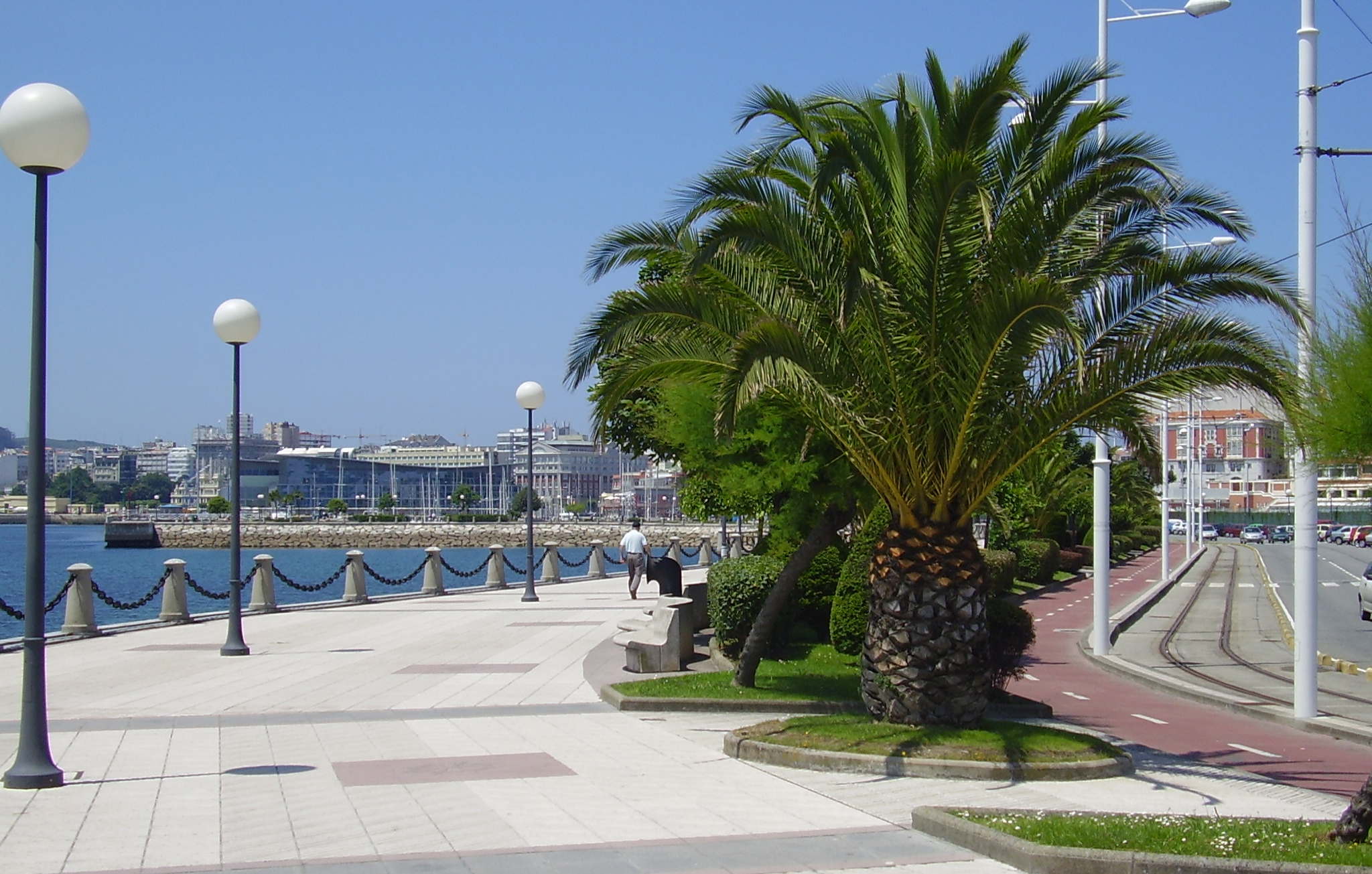 Paseo martítimo de La Coruña. Zona del Castillo de San Antón